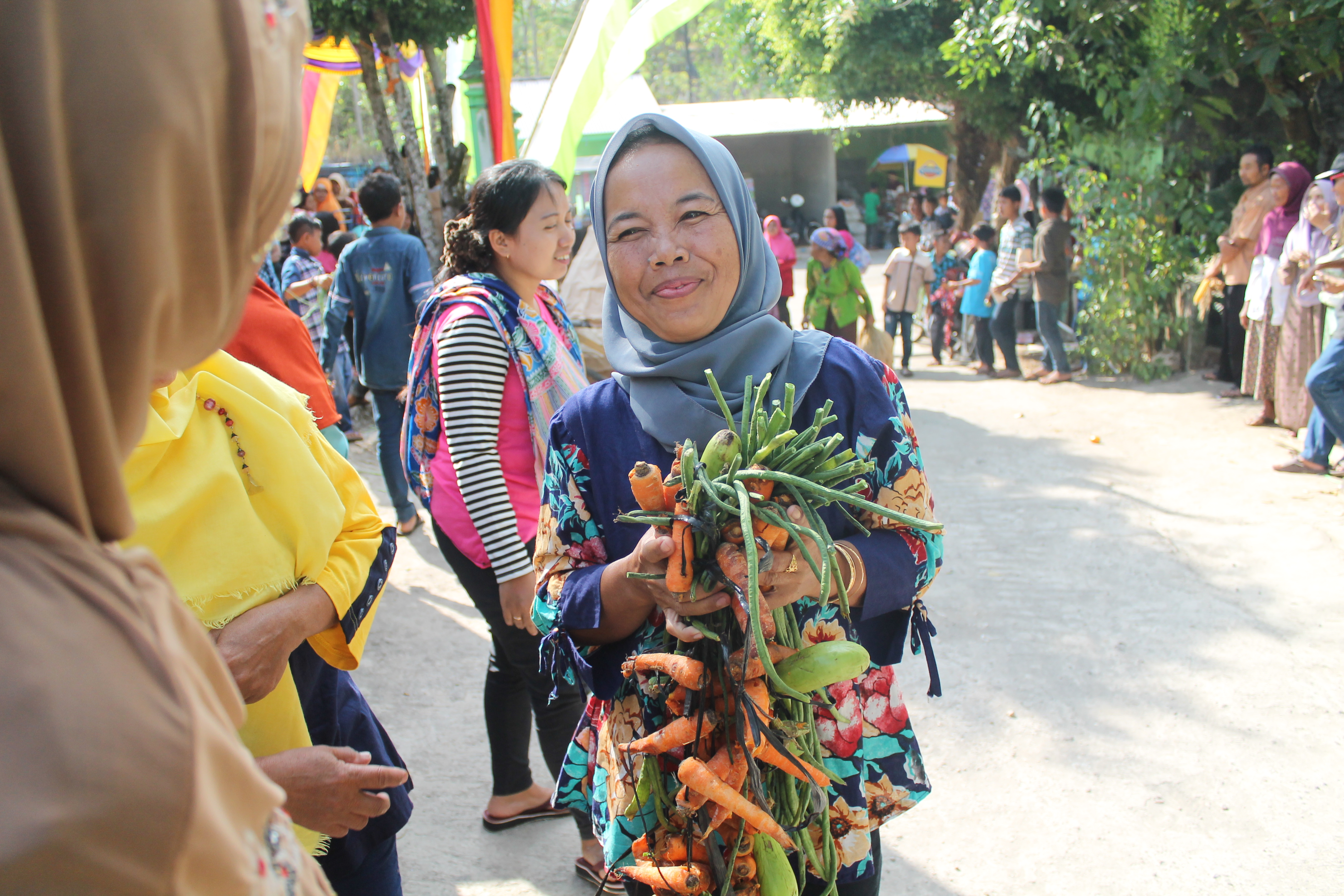 Seorang ibu yang menggenggam berbagai hasil bumi yang diperebutkan warga dari gunungan dalam acara Rasulan.